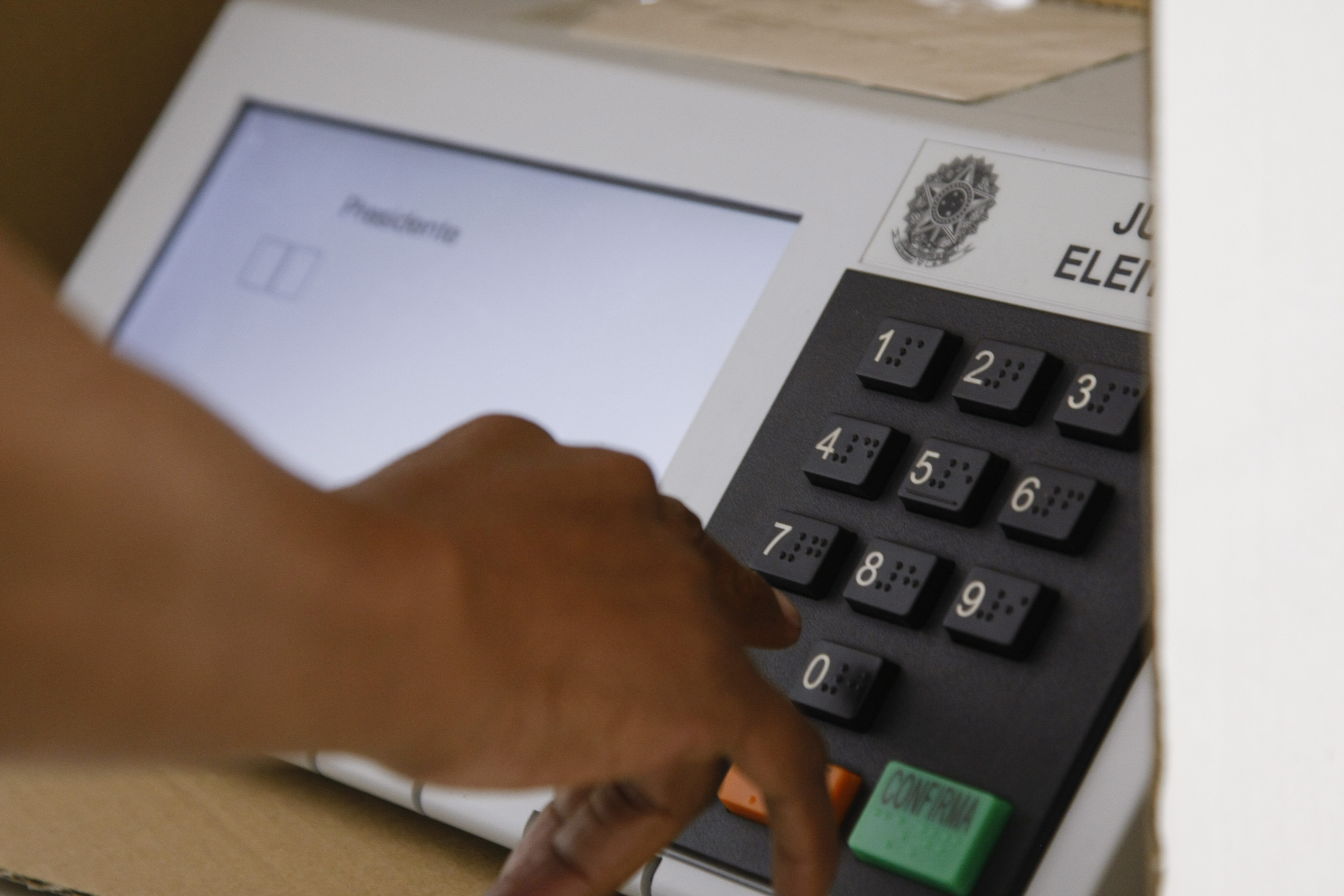 Eleições 2014 - Voto em trânsito no IESB, Asa Sul, Brasília. Foto: Marri Nogueira/Agência Senado